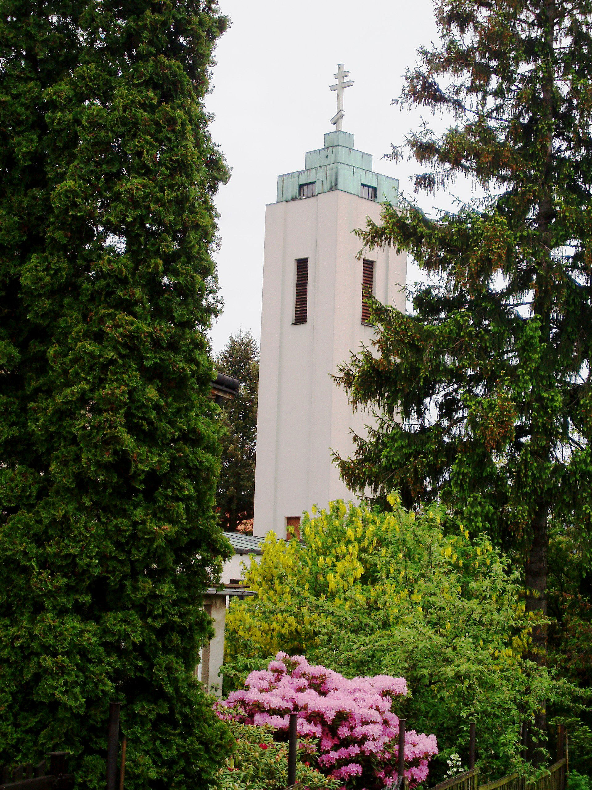 Kostel sboru církve československé husitské